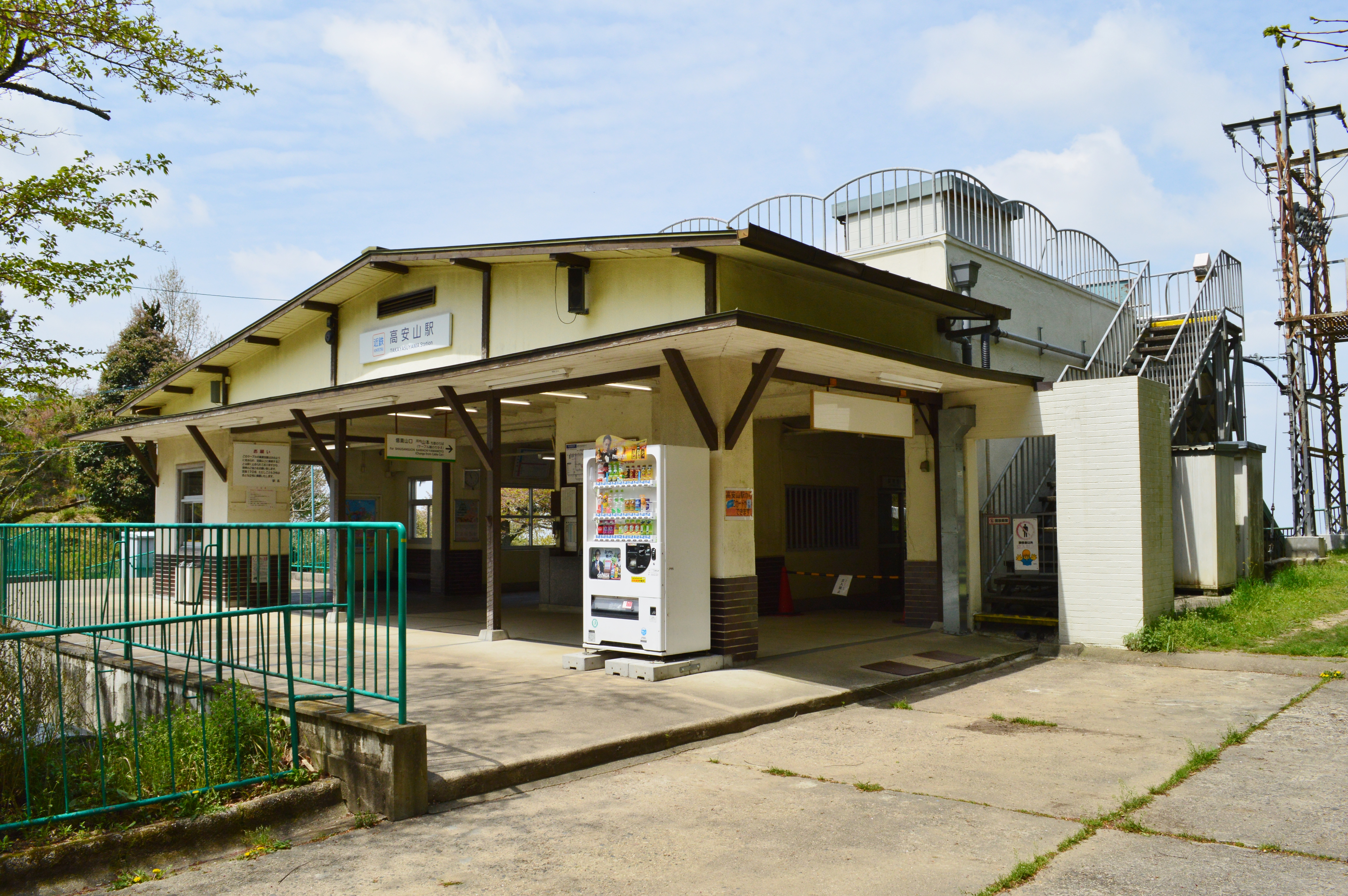 高安山駅 駅舎